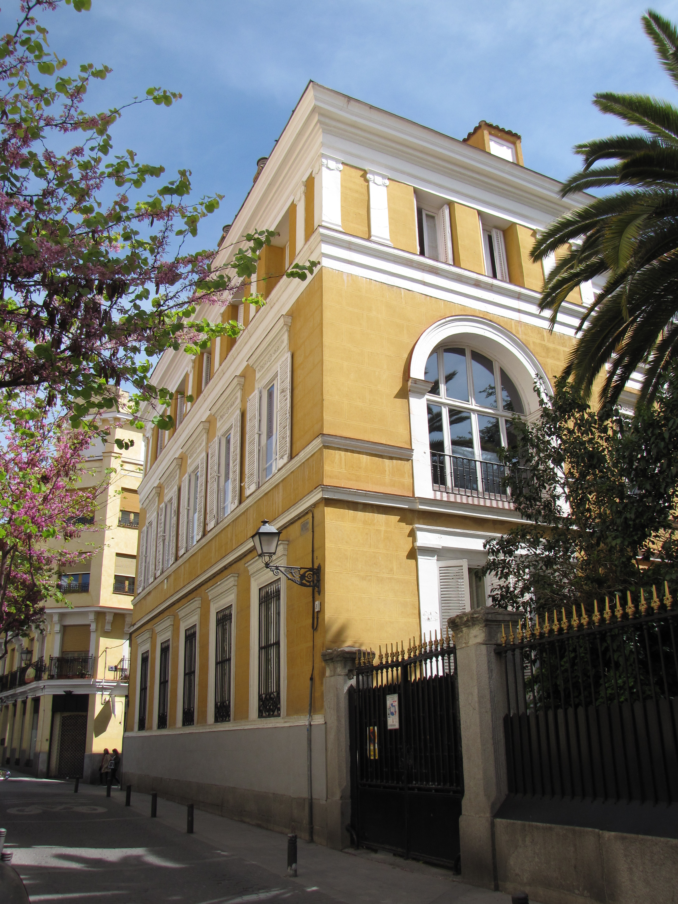 Fotografía de la fachada trasera de la casa-palacio del Marqués de Viluma.